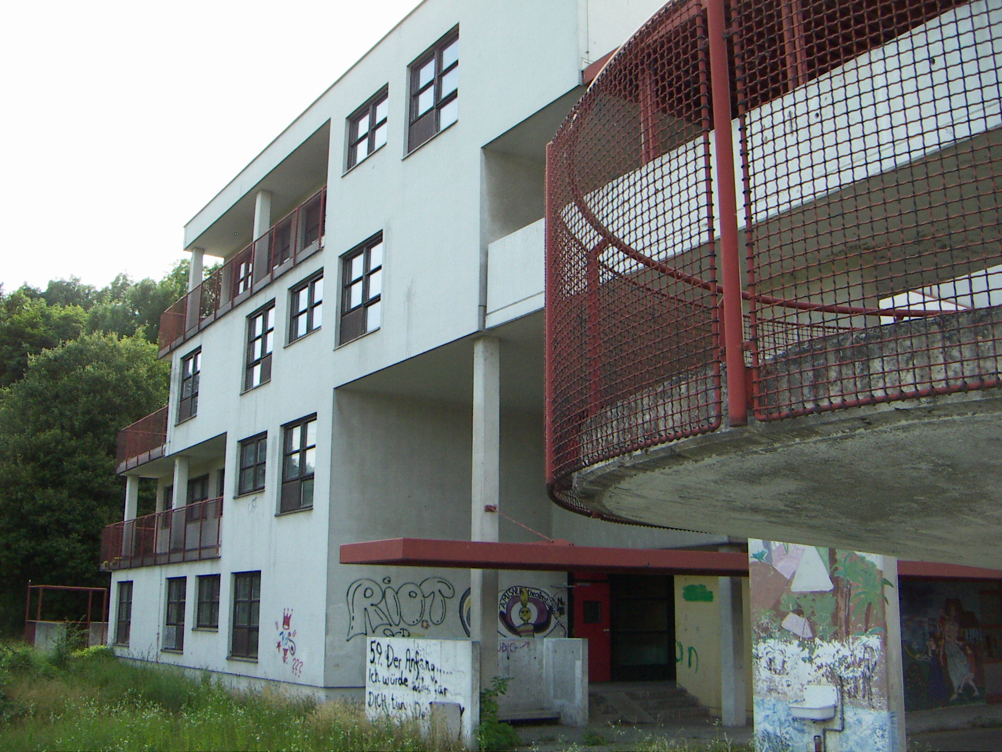 Stadt des Kindes, Wien Penzing, Architekt Anton Schweighofer, Sozialpädagogisches Konzept: Maria Jacobi, Gesiba 1969-1974, Bauherr: Kuratorium für Wiener Jugendheime